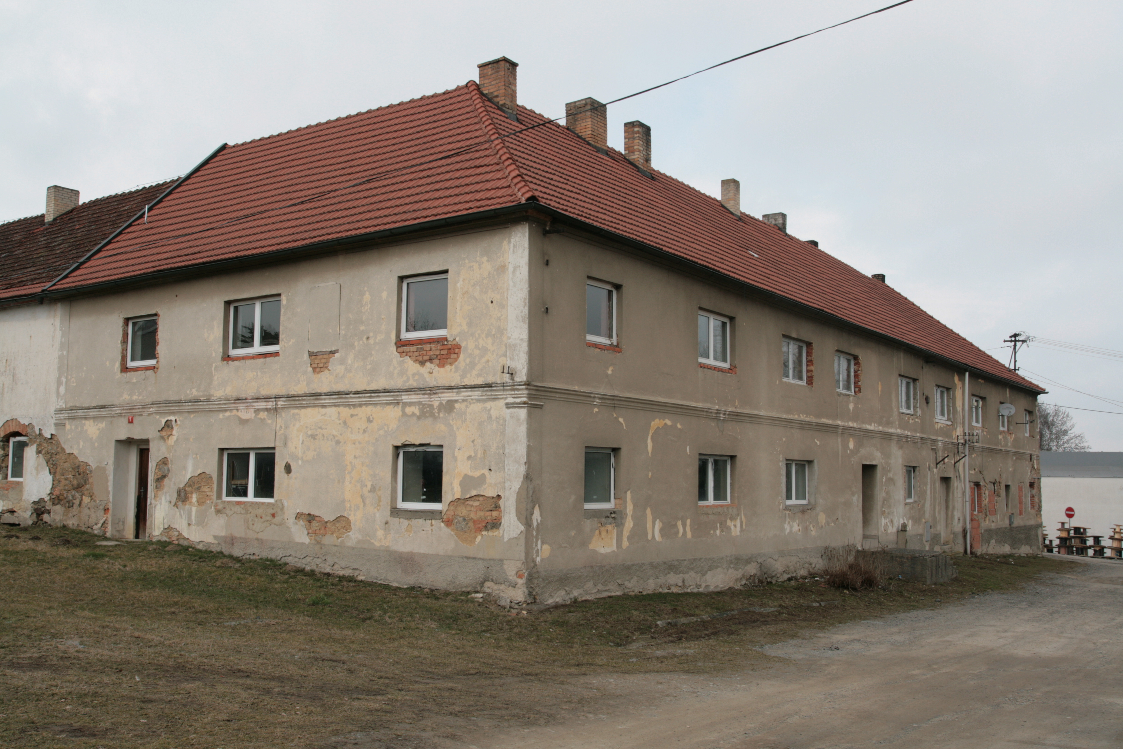 Vesnice Skoronice, část obce Bujanov v okrese Český Krumlov. Statek č. 1, rohový pohled od jihu.